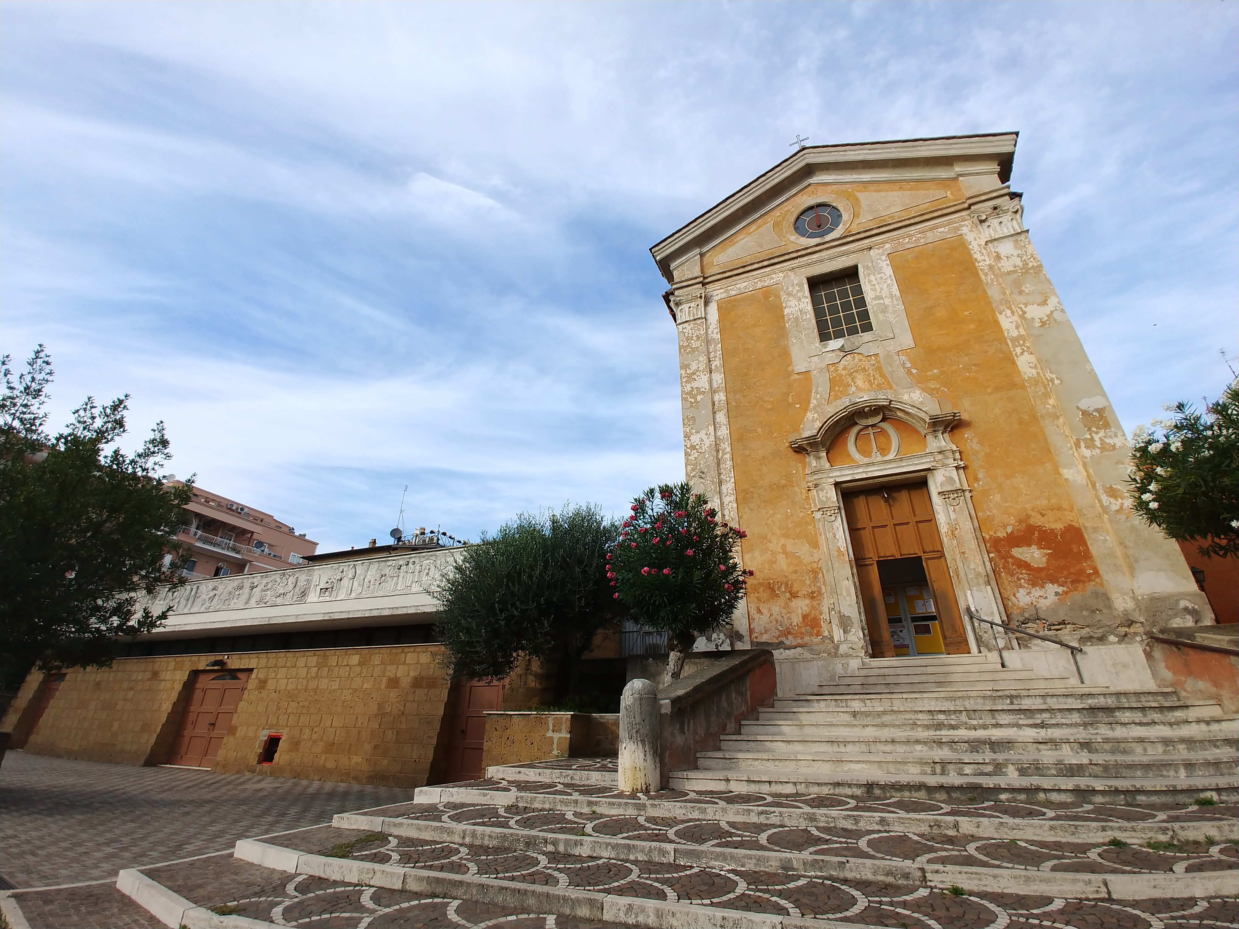 Esterno della chiesa vecchia e di quella nuova.